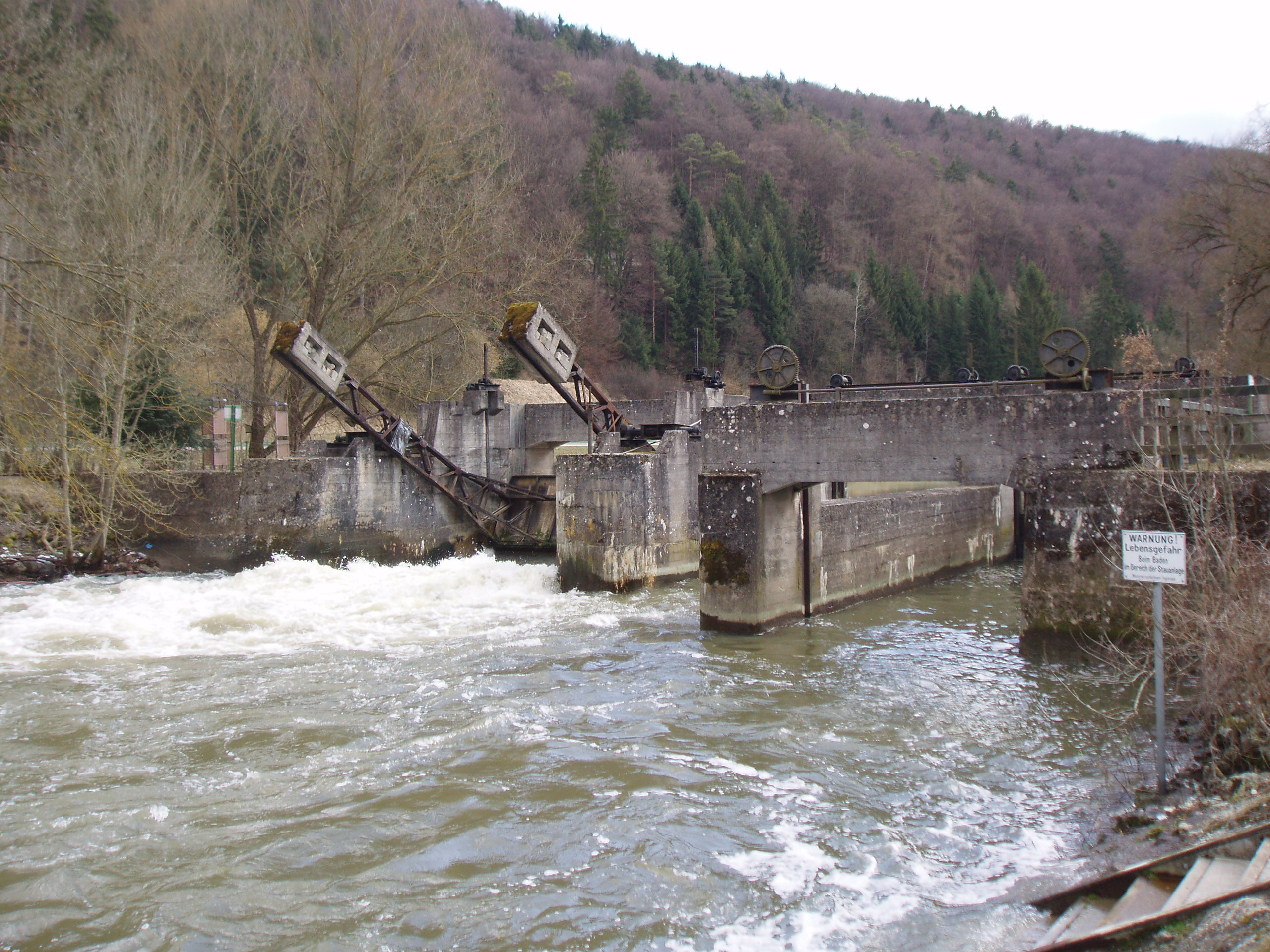 Altmühl-Wehr_bei_der_Mühle_Walting_von_1927/28